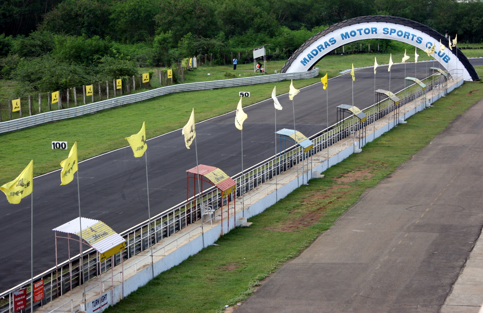 Irungaattukkottai racing track near Sriperumbadur Chennai